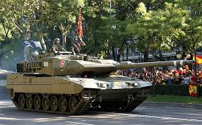 Tanque de la Armada Española en desfile por la capital Madrid.